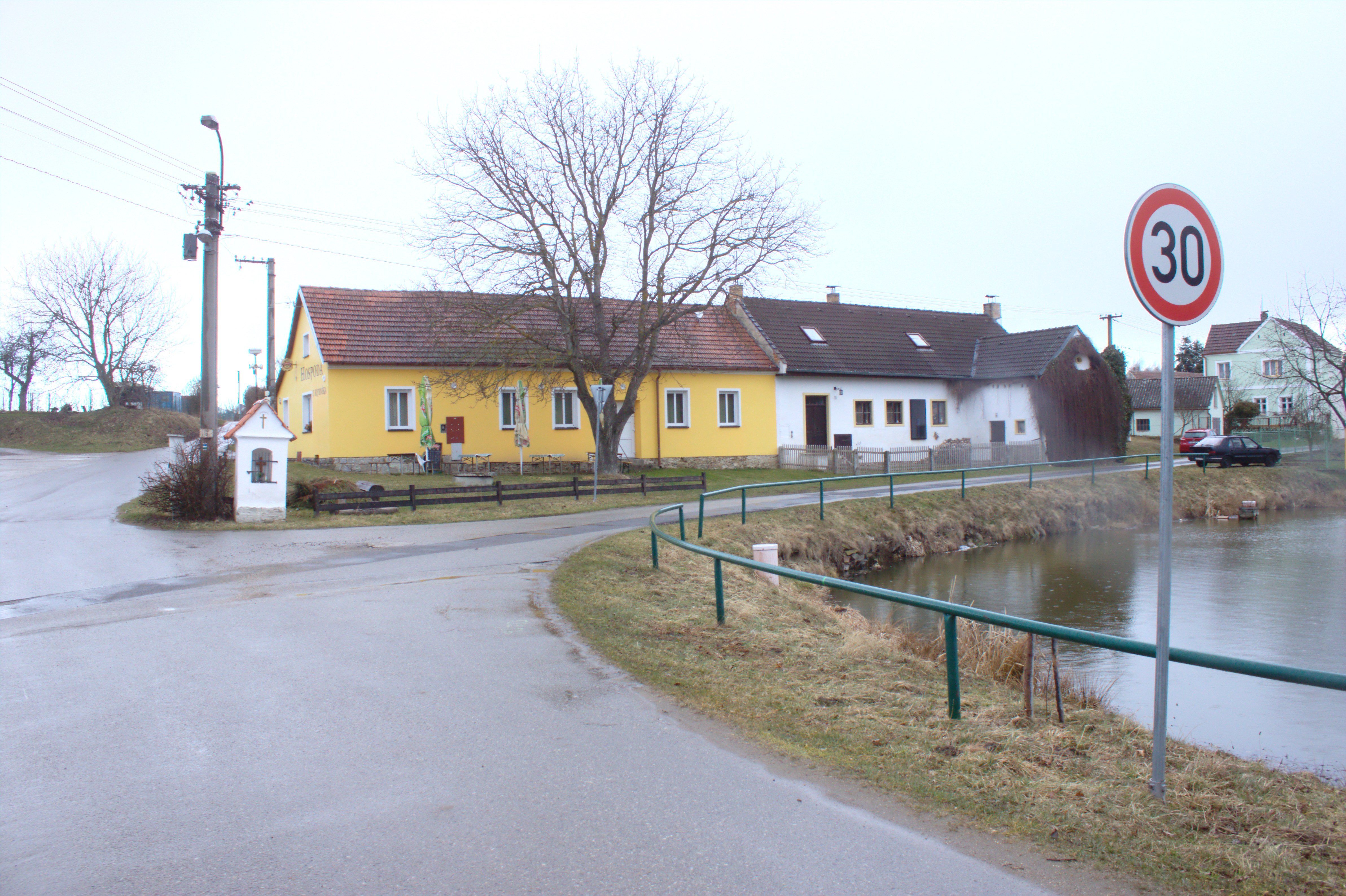 Hráz rybníka ve vesnici Sedlce Project: Fotíme Česko